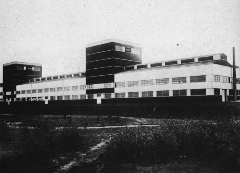 Månsbo aluminiumfabrik